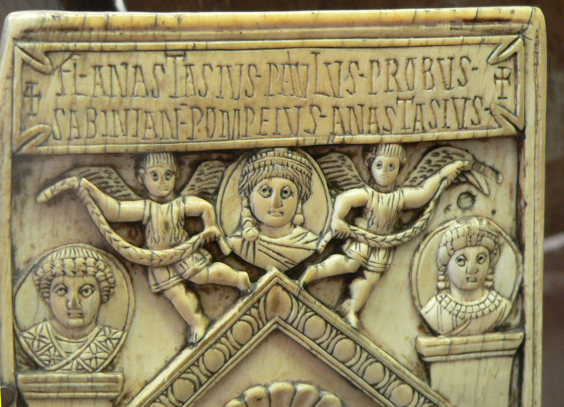 Diptyque de Flavius Anastasius Probus Diptyque, feuillet droit, détail. Consul en 517, Constantinople, Ivoire d'éléphant, Ancien trésor de Saint-Etienne de Bourges.